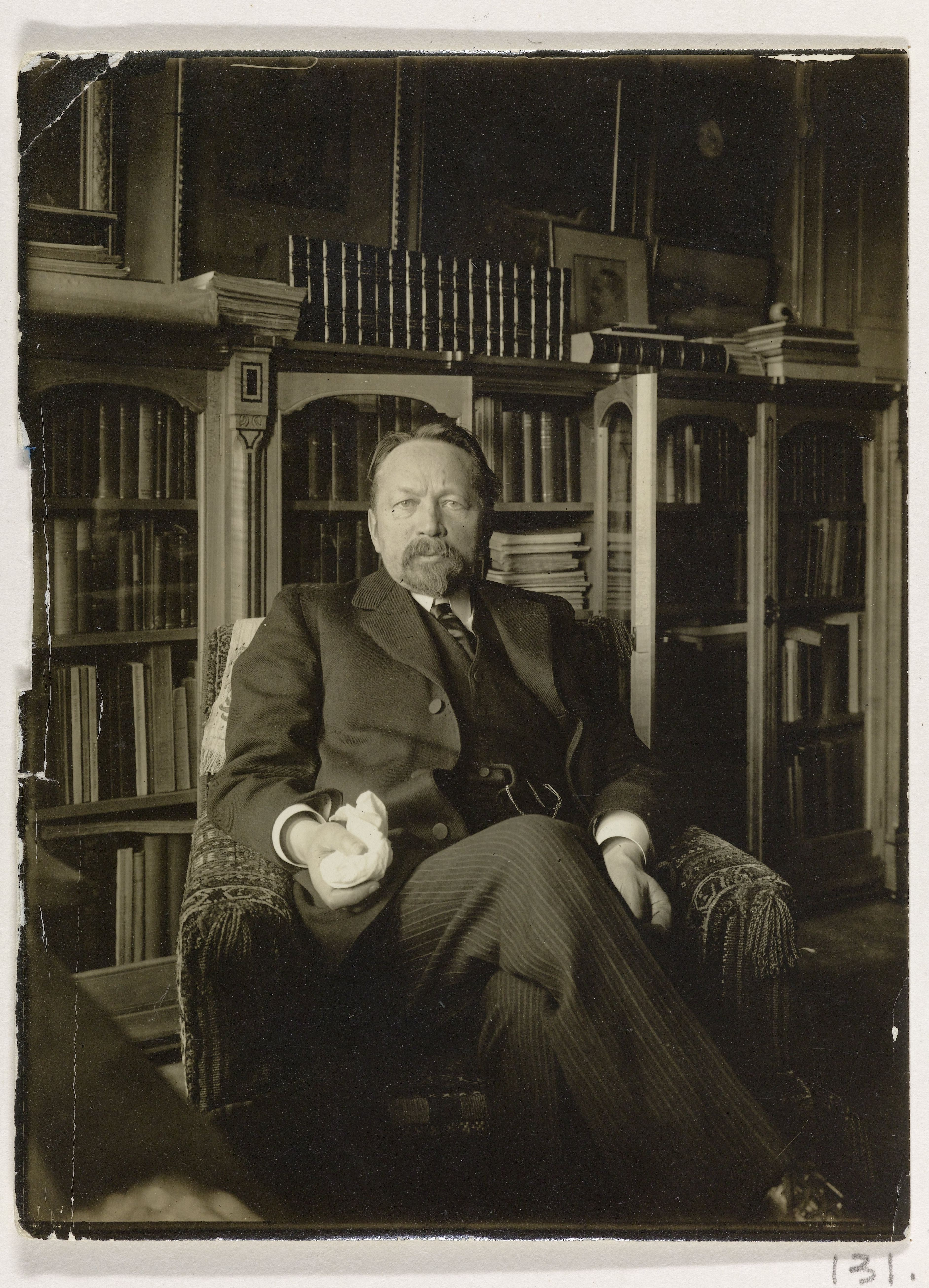 IdentificatieTitel(s): Andries Bonger, op middelbare leeftijd, gezeten in leunstoelObjecttype: foto Objectnummer: RP-F-00-1426VervaardigingVervaardiger: fotograaf: anoniemDatering: 1910 - 1930Fysieke kenmerken: papier op kartonMateriaal: papier fotopapier karton Techniek: ontwikkelgelatinezilverdrukAfmetingen: foto: h 119 mm × b 90 mmOnderwerpWat: namen van steden en dorpenother dwelling typeshistorical person (BONGER, Andries) - historical person (BONGER, Andries) portrayed aloneWaar: AmsterdamWie: Andries BongerVerwerving en rechtenCredit line: Legaat van de heer S. CrommelinVerwerving: legaat 1985Copyright: Publiek domein